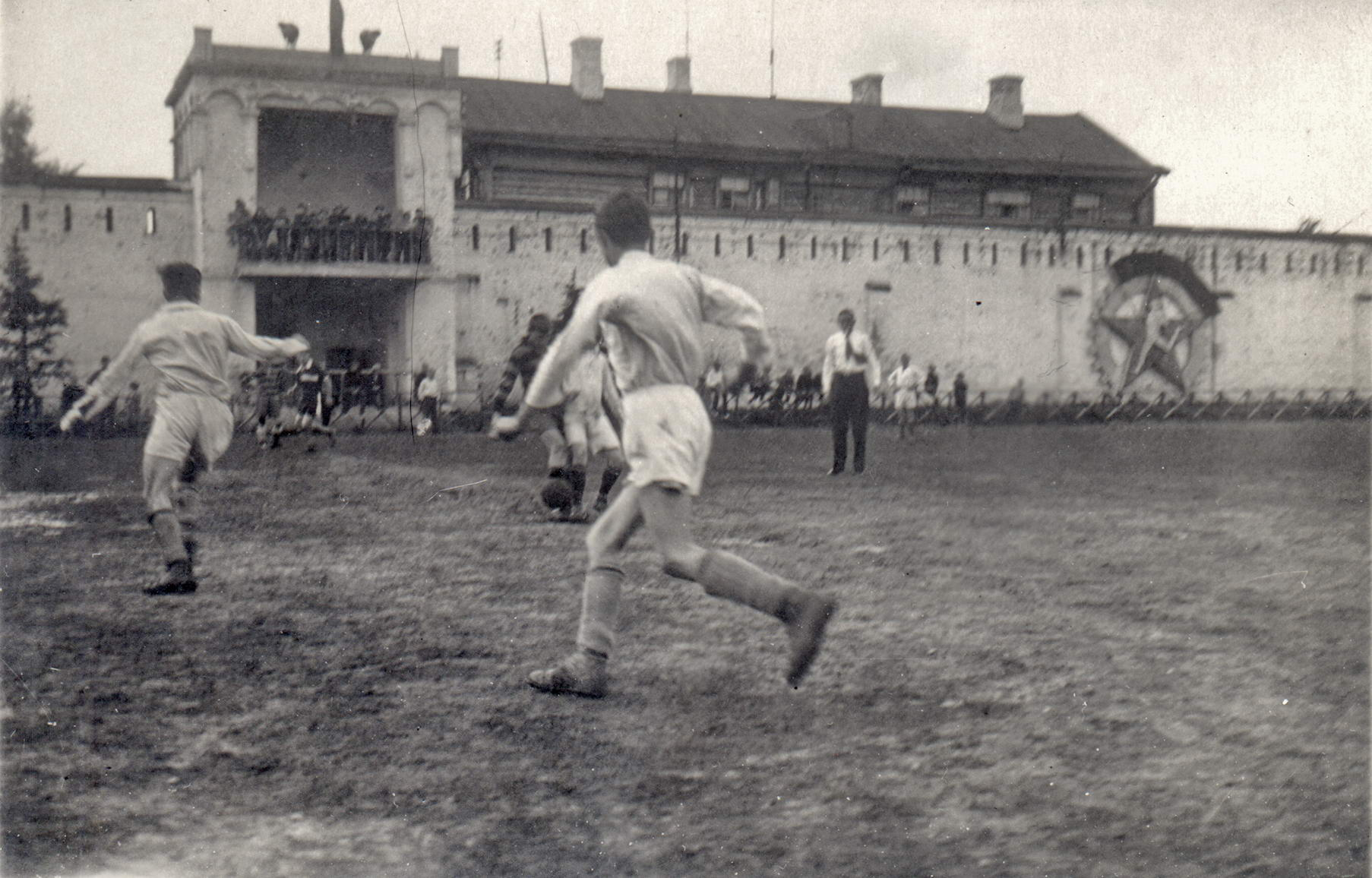 Футбольный матч в Ждановском (Таганском) парке в Москве. 1930-е года.